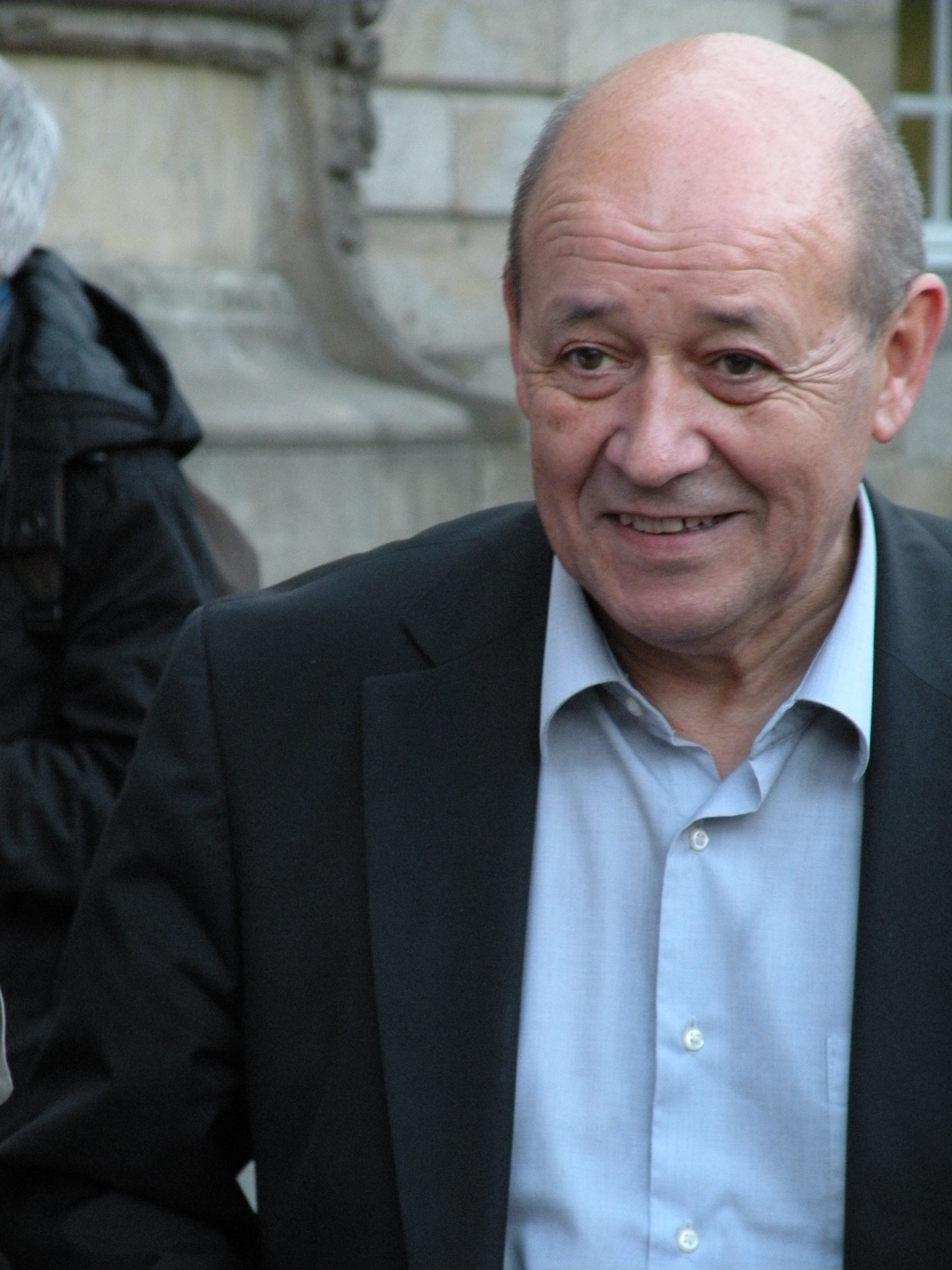 Jean-Yves Le Drian sur la place de la Mairie à Rennes, le 6 mai 2012 à l'occasion de l'élection de François Hollande.